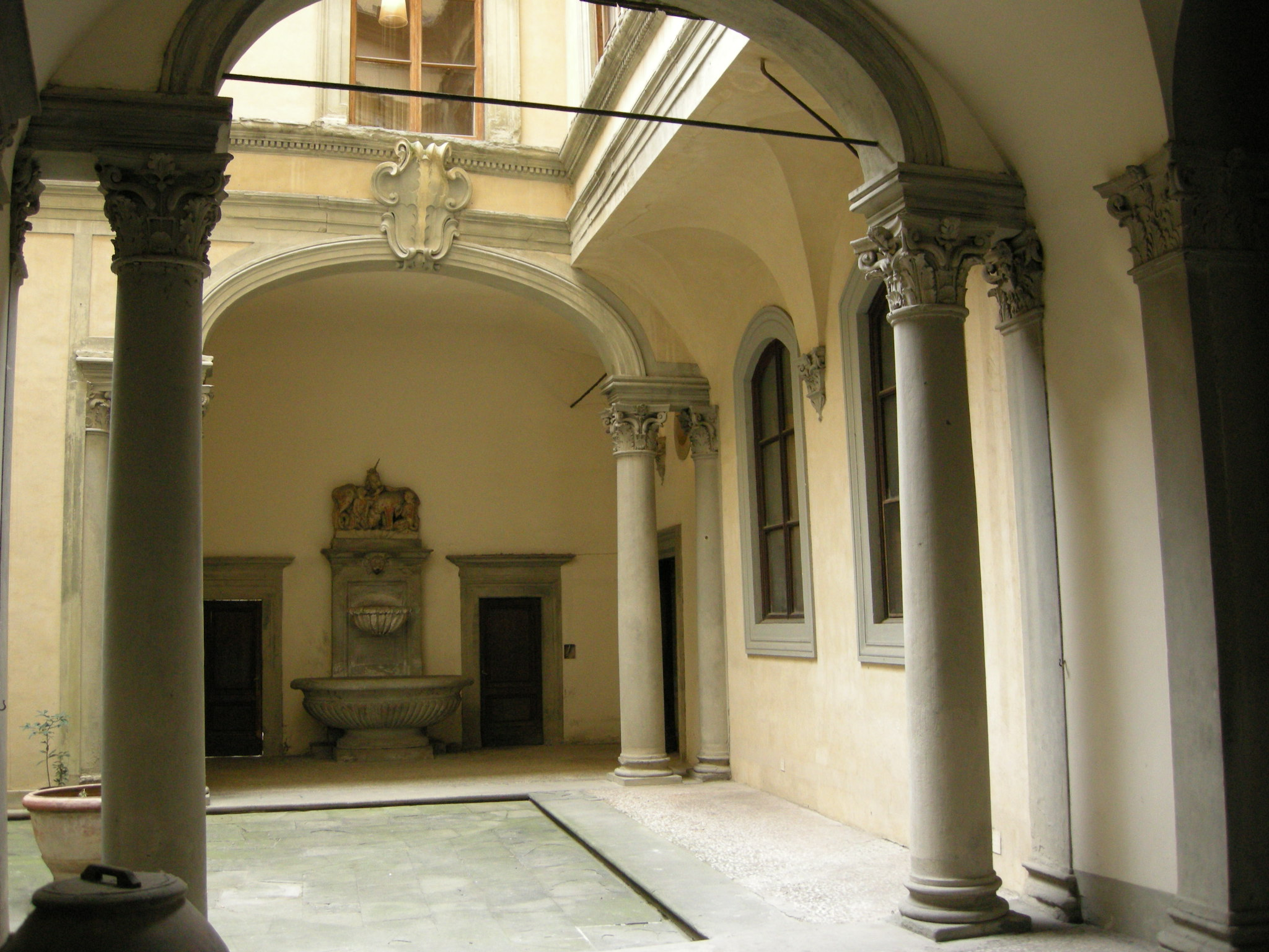 Palazzo guadagni, cortile